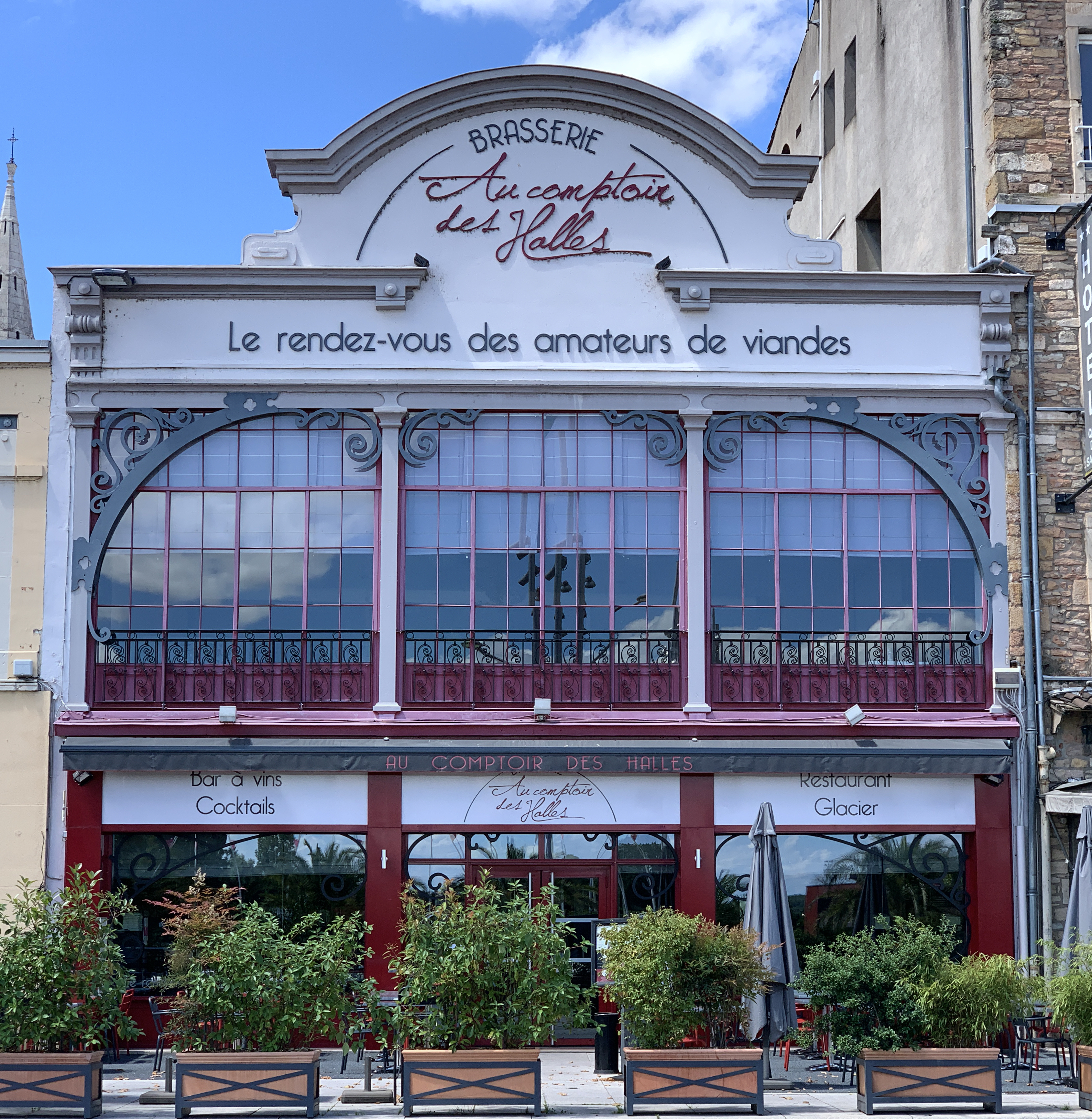 Ancien cinéma Pathé, Mâcon.